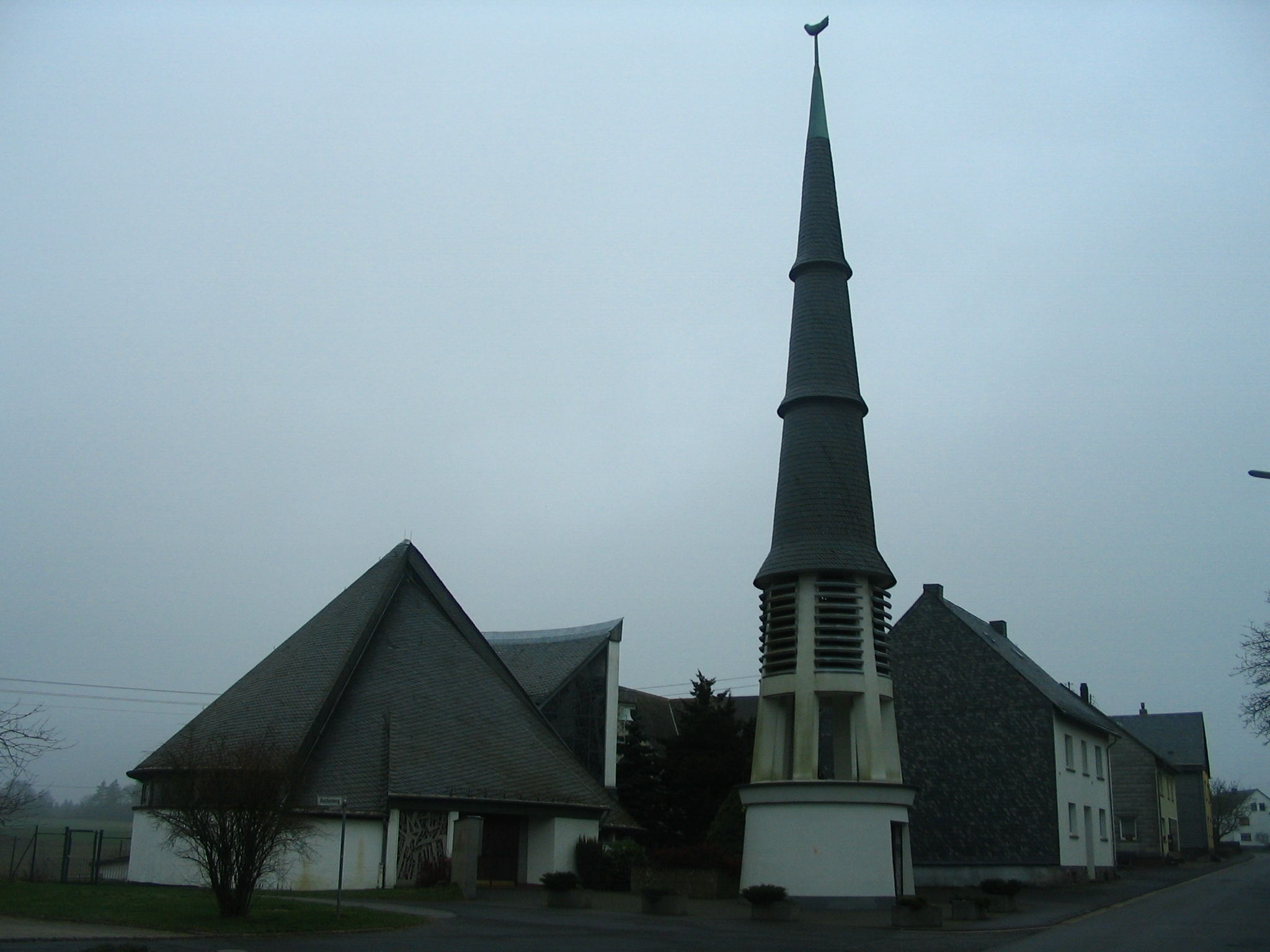 moderner Kirchbau in Löffelschied